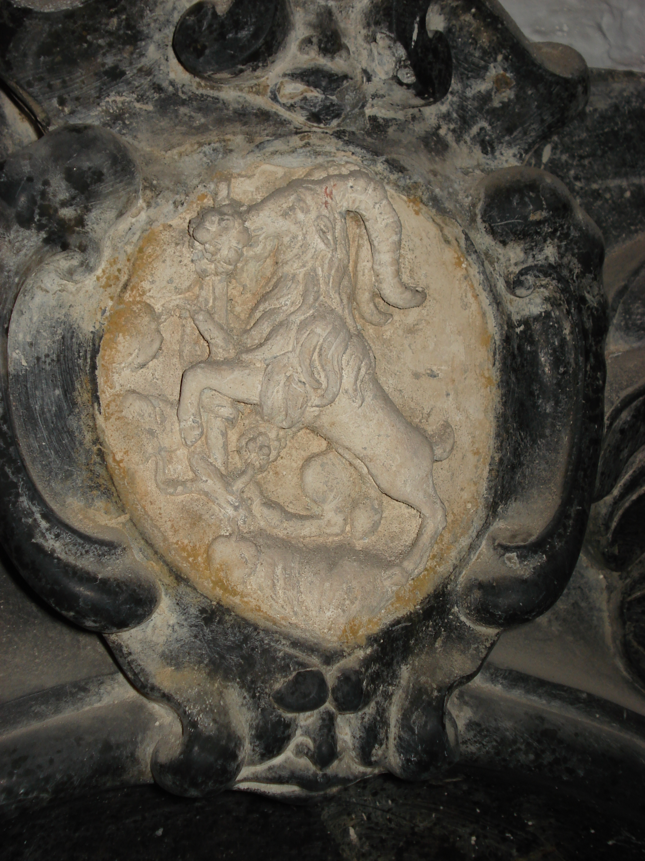 Pock_J.J._Wappen